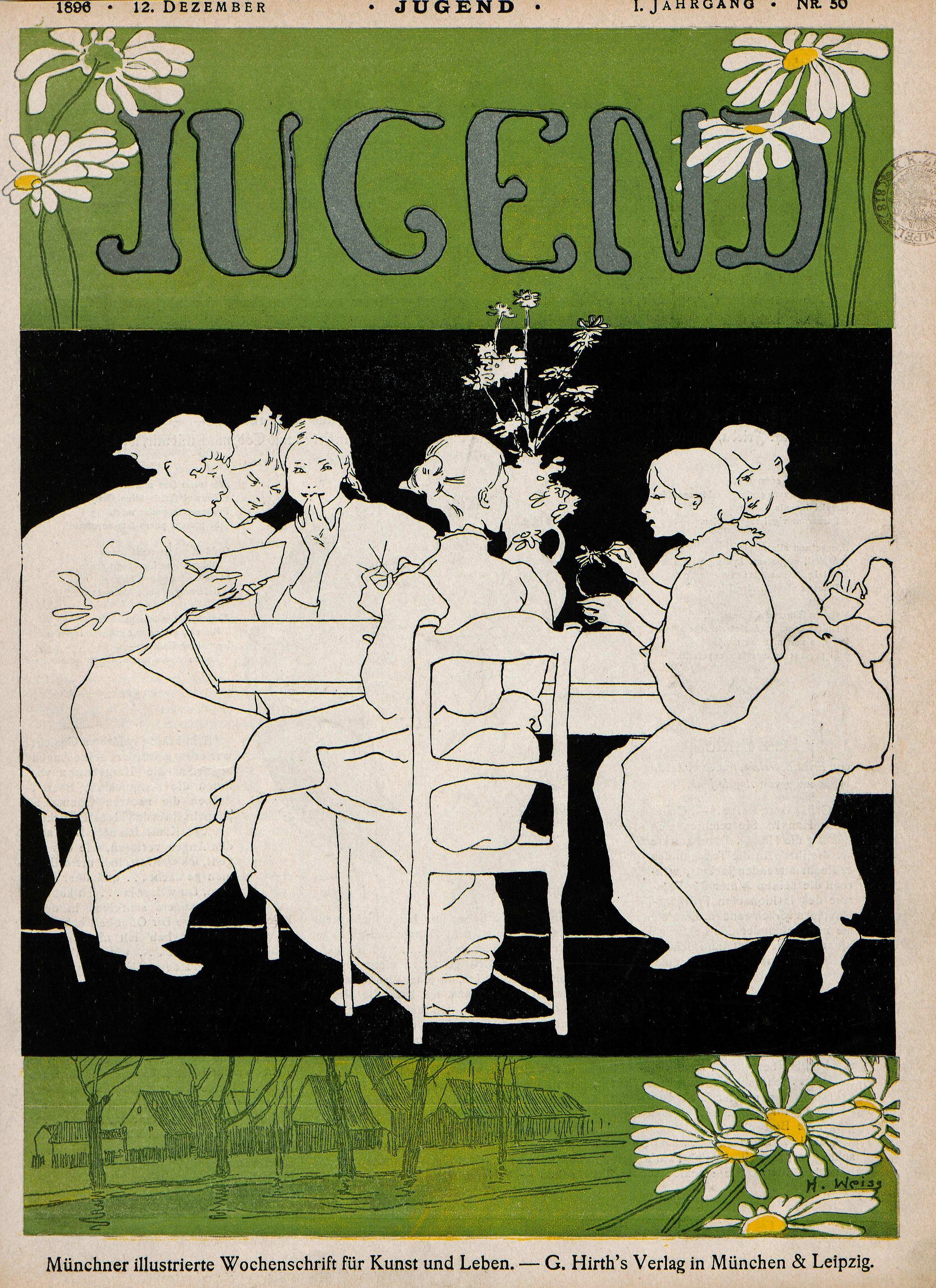 Hedwig Weiß - Umschlag der Kunst- und Literaturzeitschrift "Jugend", Ausgabe Nr. 50/1896.